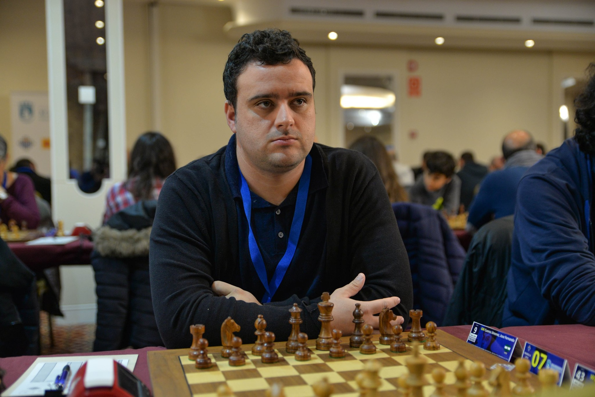 Pepe Cuenca disputando el Campeonato de España Absoluto 2019